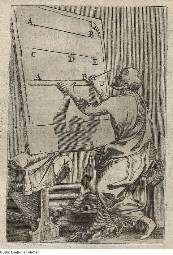 Original image description from the Deutsche Fotothek Geometrie & Konstruktion & Strecke & Messinstrument